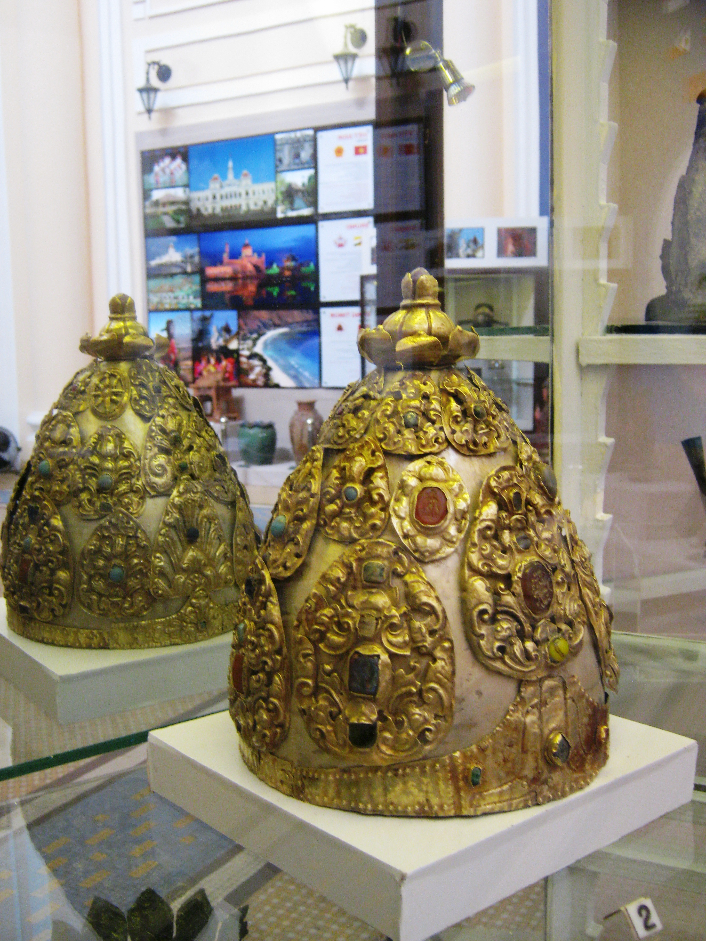 Mão vàng của Po Klong M'hnai, được chế tác trong khoảng thế kỷ XVII-XVIII, hiện đang trưng bày tại Bảo tàng Lịch sử Việt Nam thuộc Thành phố Hồ Chí Minh.